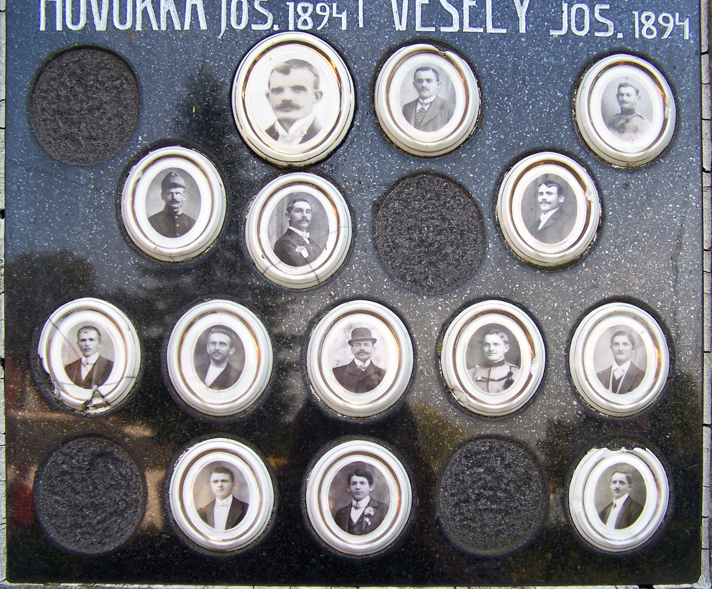 Památník ratenickým obětem první světové války.